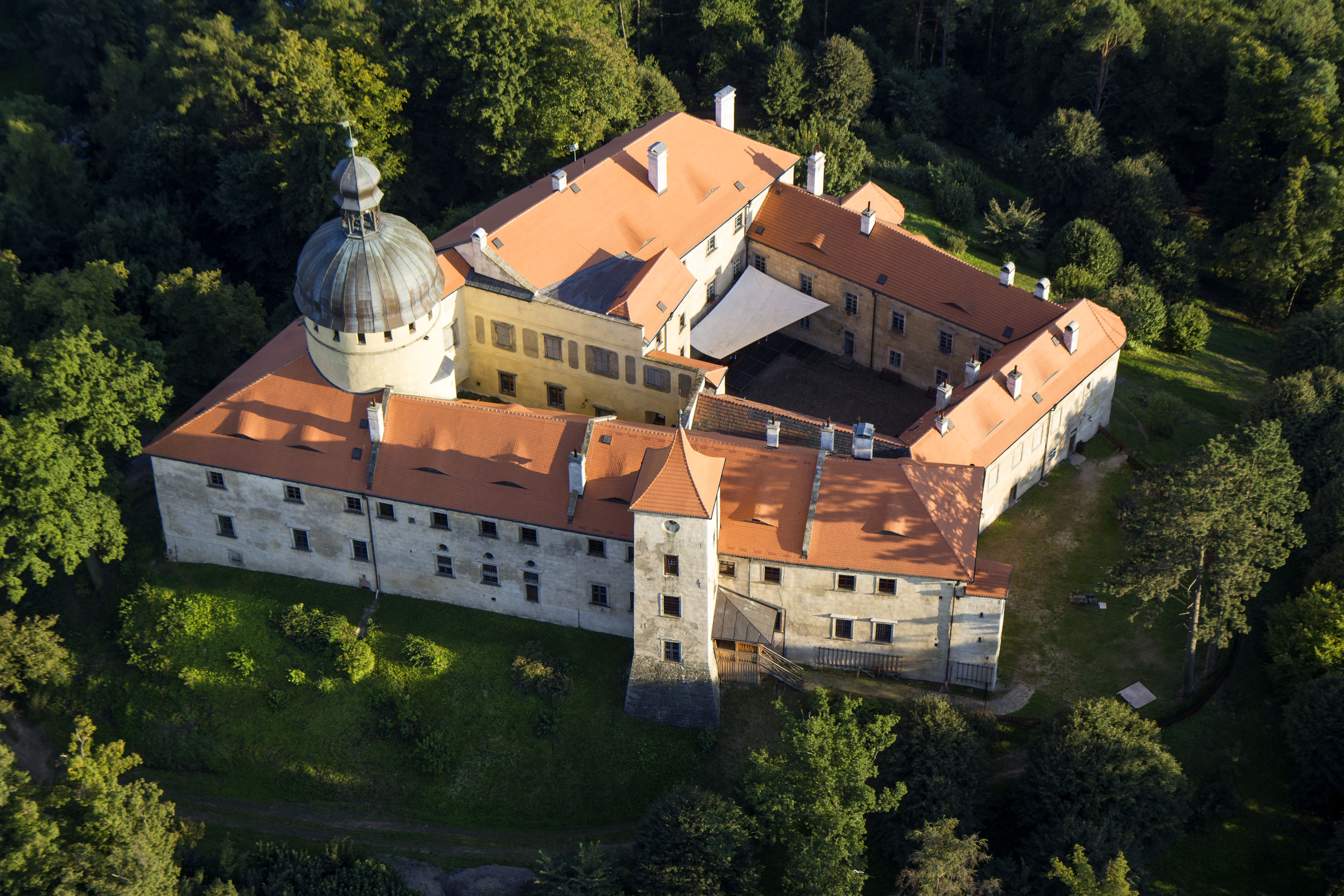 Hrad a zámek Grabštejn, Grabštejn 21, Grabštejn (Chotyně).